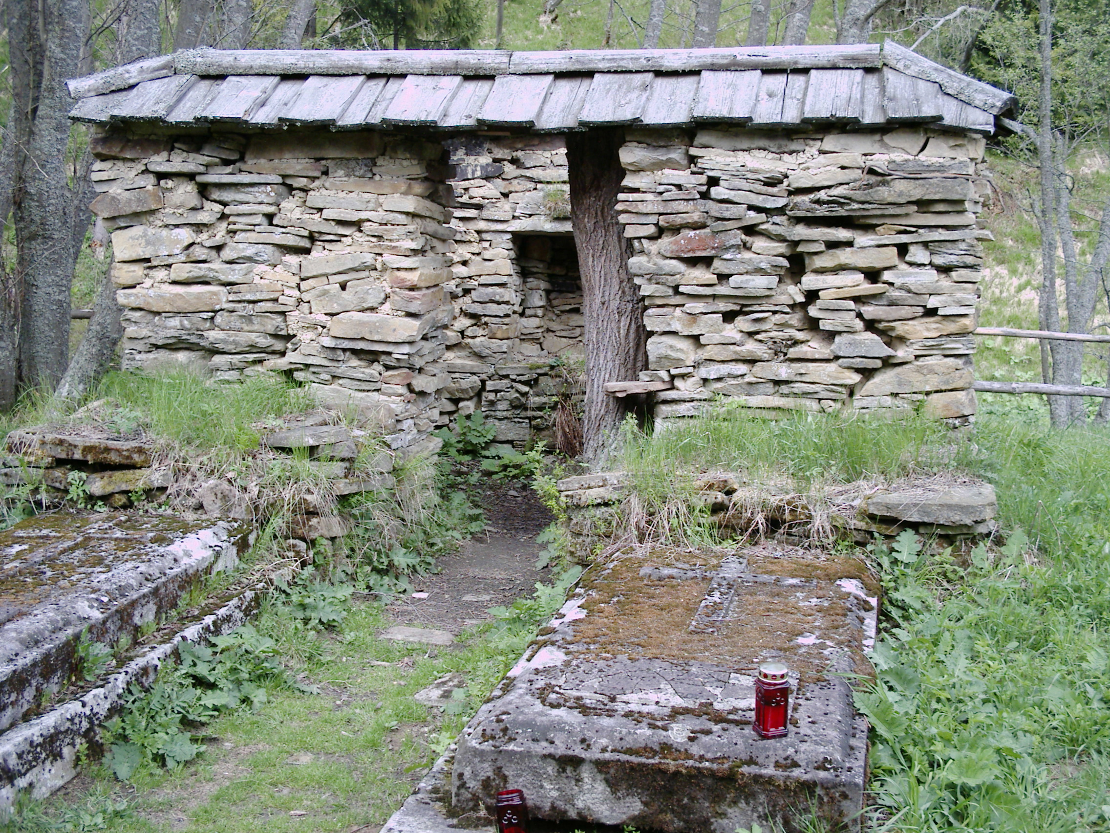 Grobowiec Stroinskich na cmentarzu w Siankach